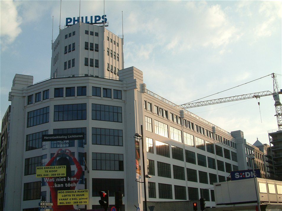 Lichttoren in Eindhoven